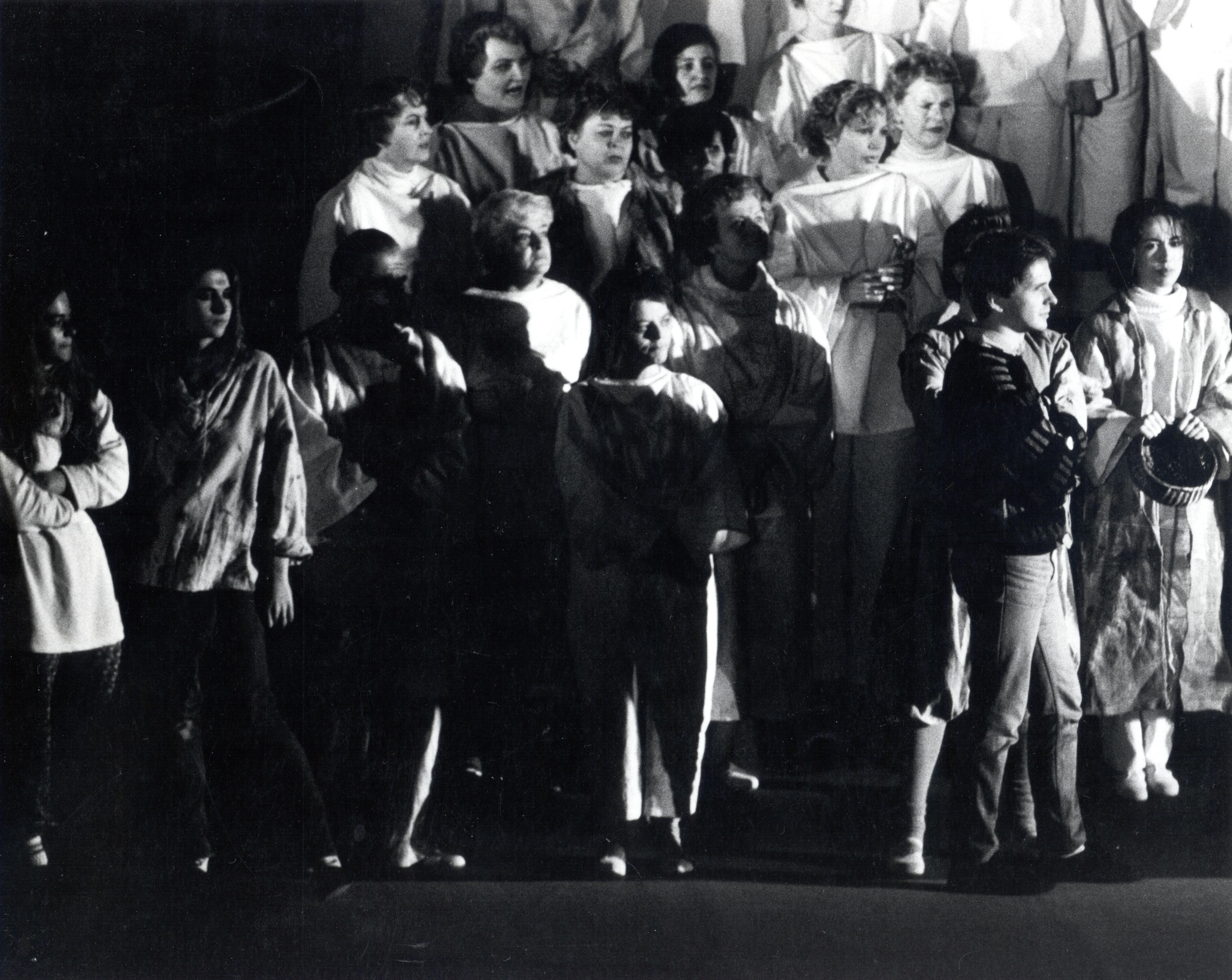 Generalprobe zur szenischen Aufführung von Telemanns "Tag des Gerichts" am 13. November 1984 (Regie: Christoph Bleidt, Musikalische Leitung: Klaus-Peter Pfeifer [rechts im Bild])